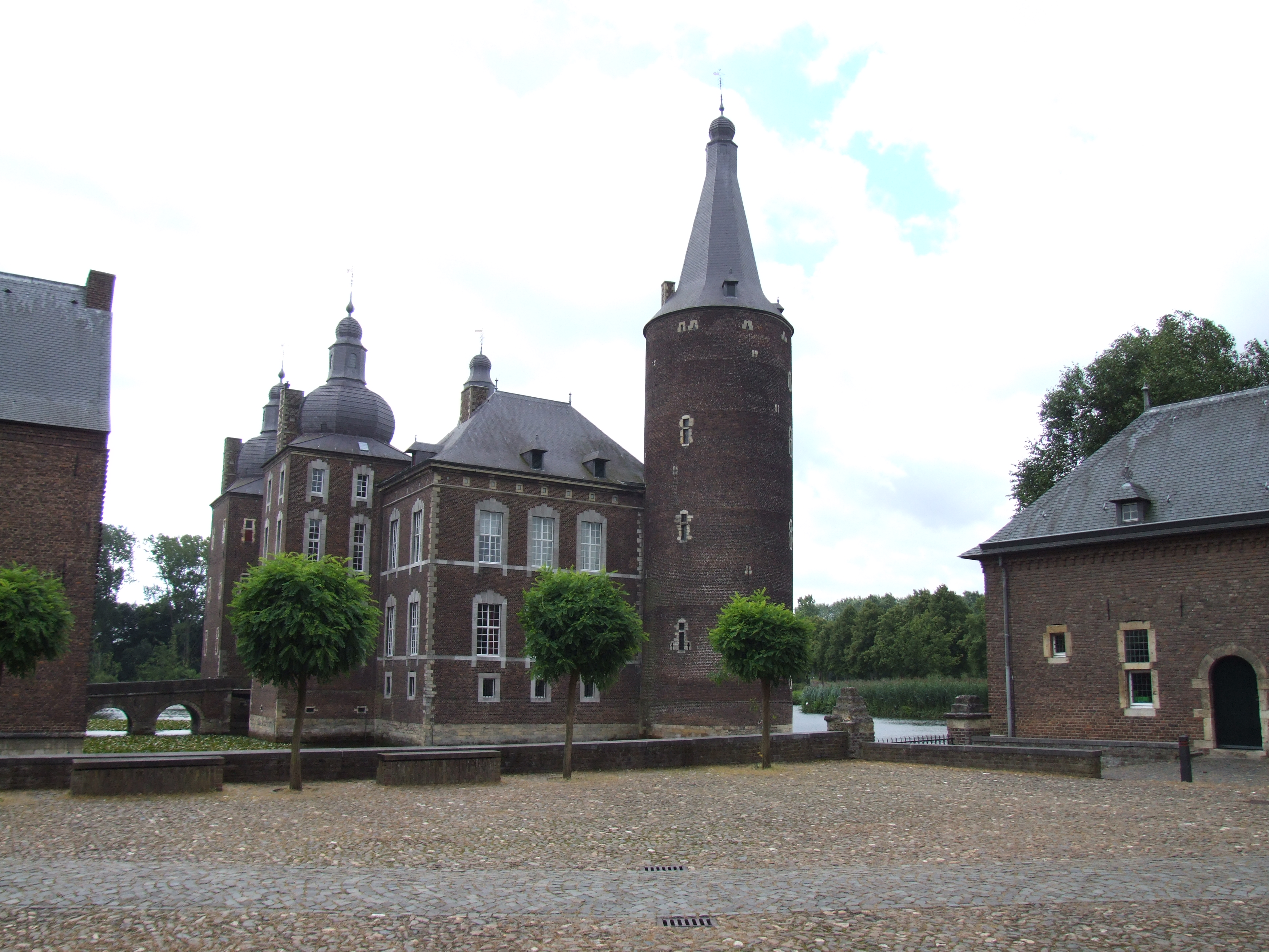 Das Haupthaus des Schlosses Hoensbroek vom ersten Wirtschaftshof gesehen